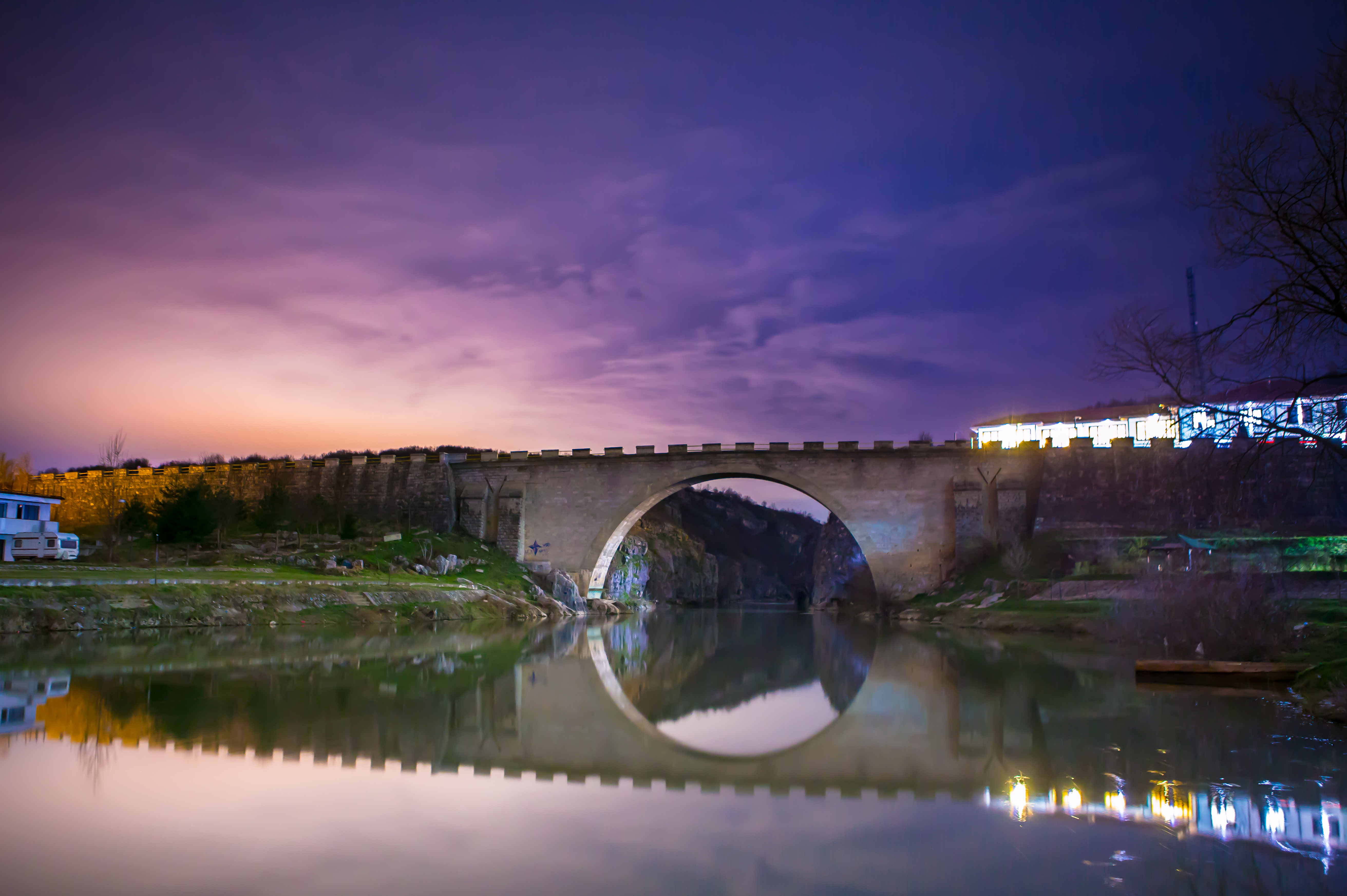 Kanioni i Drinit të Bardhë te Ura e Fshajtë, Gjakovë Rahovec